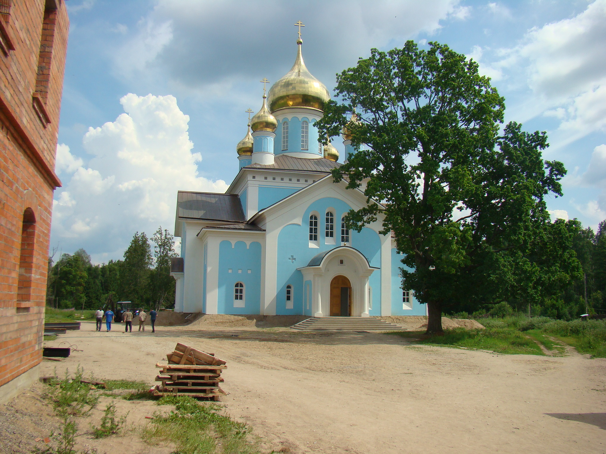 Благовещенский собор в Никандровой пустыни, Порховский район, Псковская область